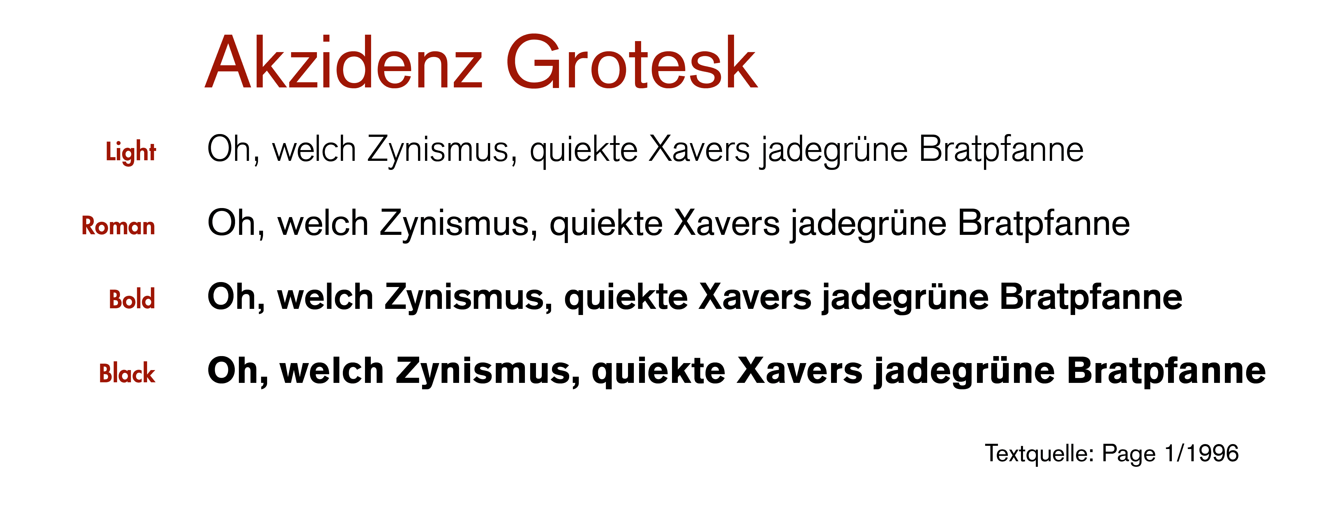 font family Akzidenz Grotesk creator: Elke Wetzig (elya)